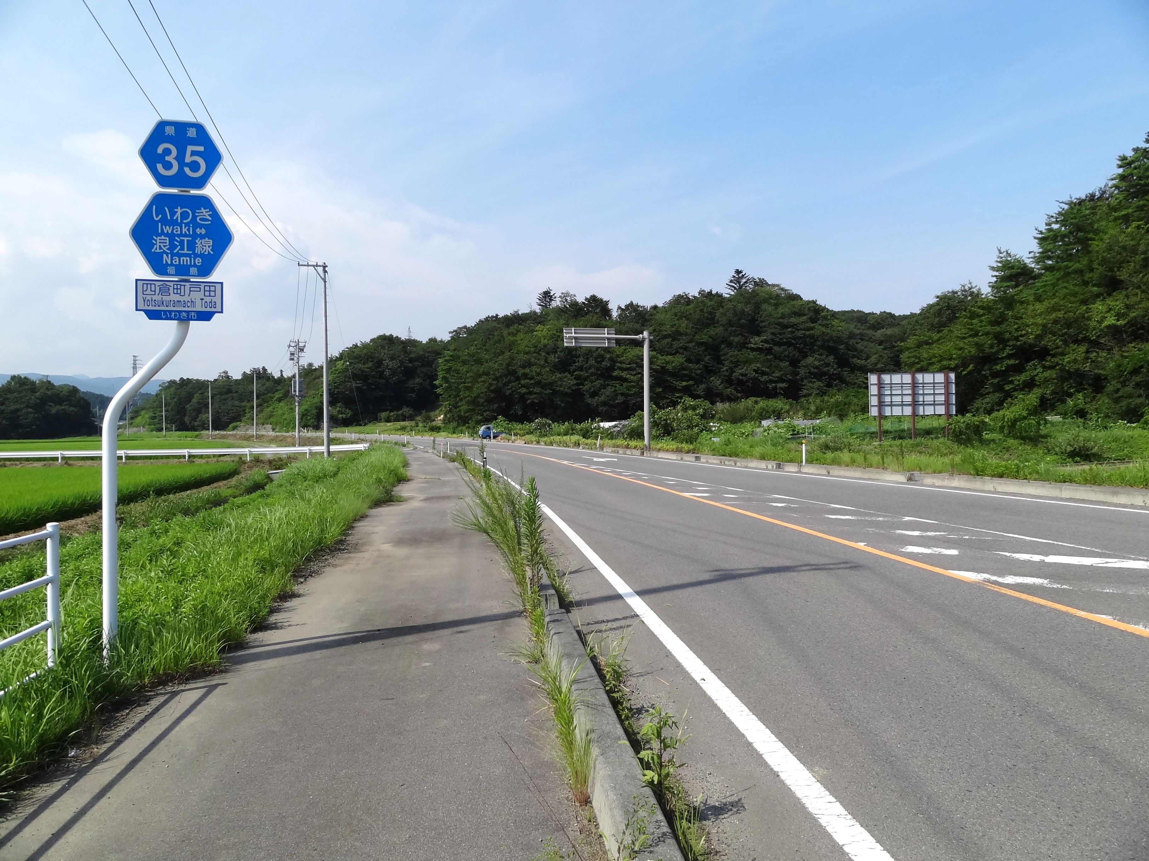 福島県道35号いわき浪江線 いわき市四倉町戸田付近